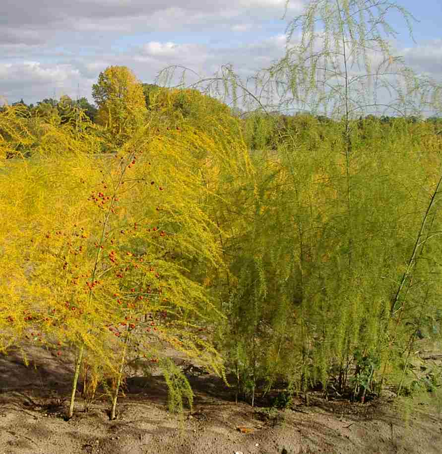 Spargelkraut bei Dambach, Stadtteil von Fürth (12. Okt. 2003)